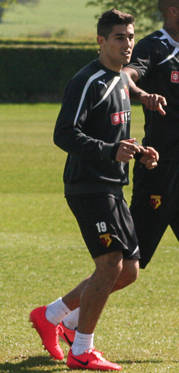 Davide Faraoni